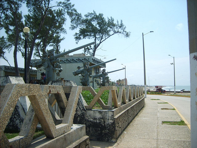 Malecon Coatzacoalcos